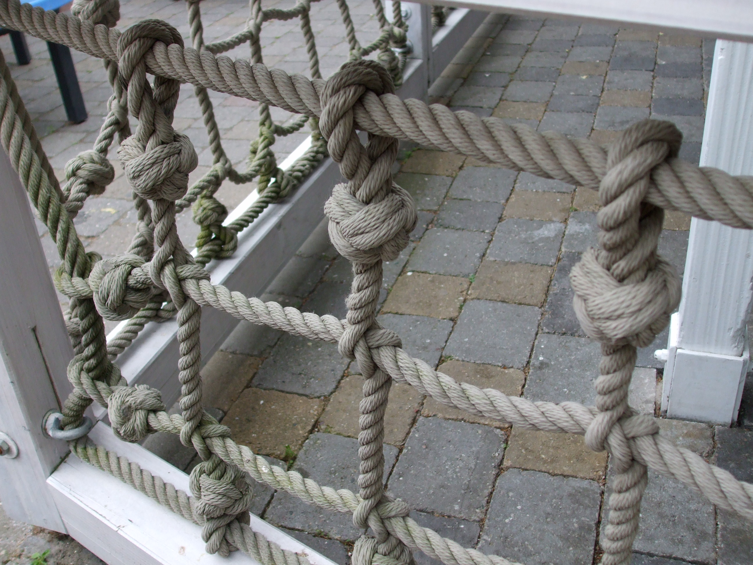 Türkenbund nach einem Augspeiß